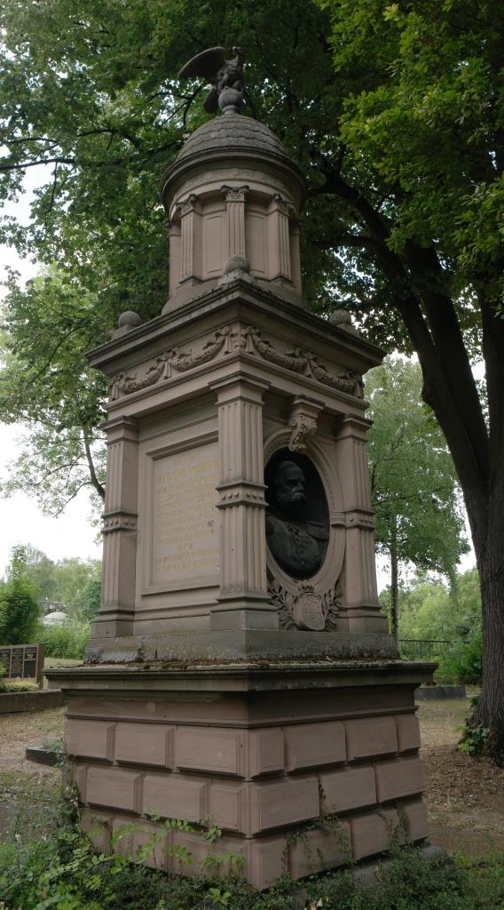 Grabmal von Heinrich Karl Woldemar von Schleswig-Holstein-Sonderburg-Augustenburg, 1810-1871, auf dem Hauptfriedhof Mainz